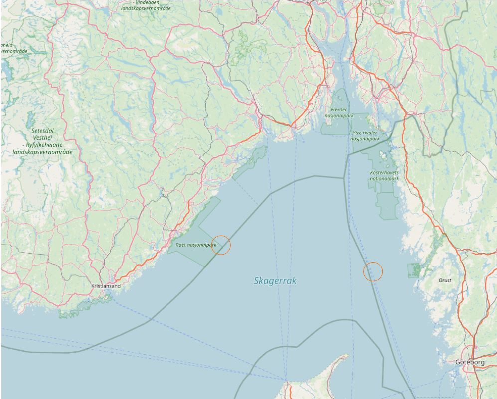 Versenkungsorte der Operation Davy Jones' Locker Karte: OpenStreetMap